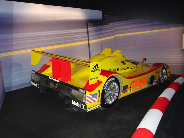 Porsche RS Spyder 2006 back